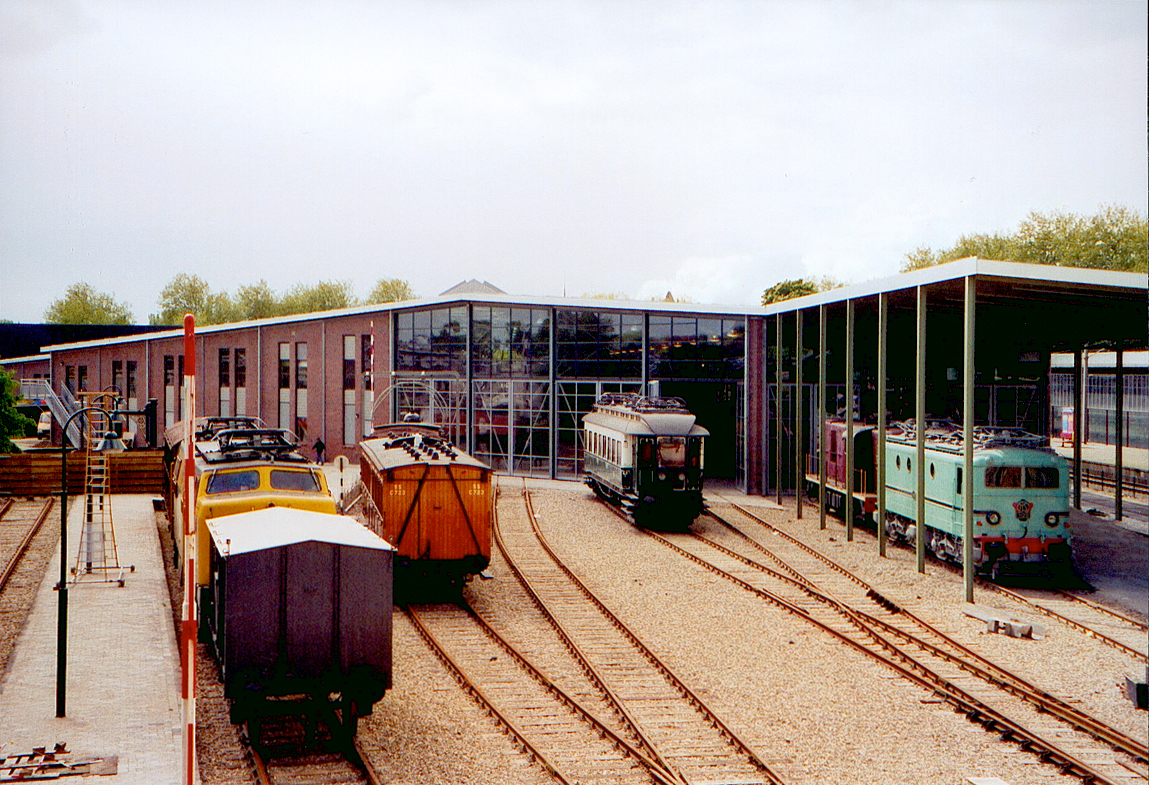 Achterzijde nieuwbouw van het Spoorwegmuseum in Utrecht met spoorlandschap